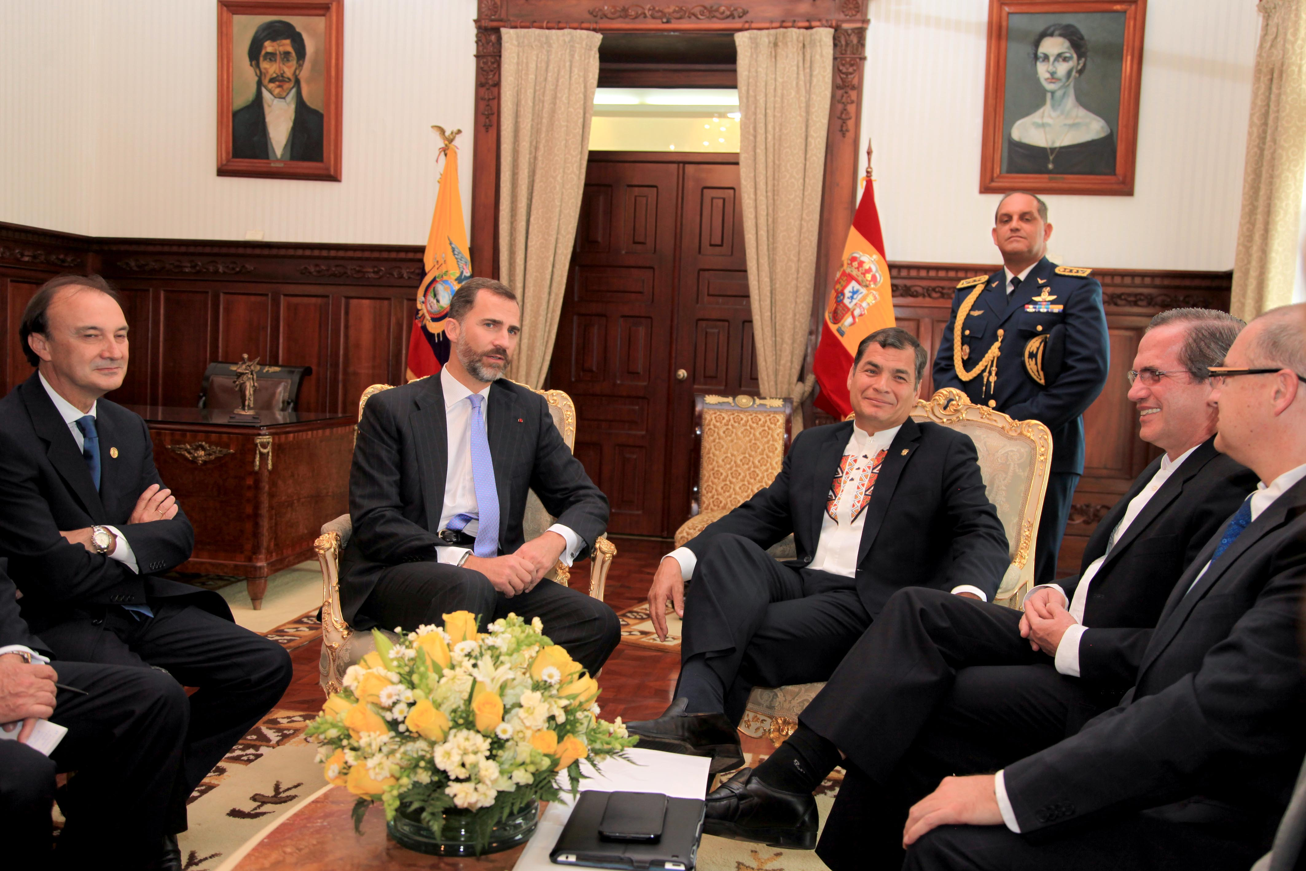 Quito (Ecuador), 05 de Octubre del 2012. El Presidente de la República, Rafael Correa junto al Ministro de Relaciones Exteriores Comercio e Integración Ricardo Patiño se reunieron con el Príncipe Felipe de Borbón. Foto: Xavier Granja Cedeño/Ministerio de Relaciones Exteriores, Comercio e Integración